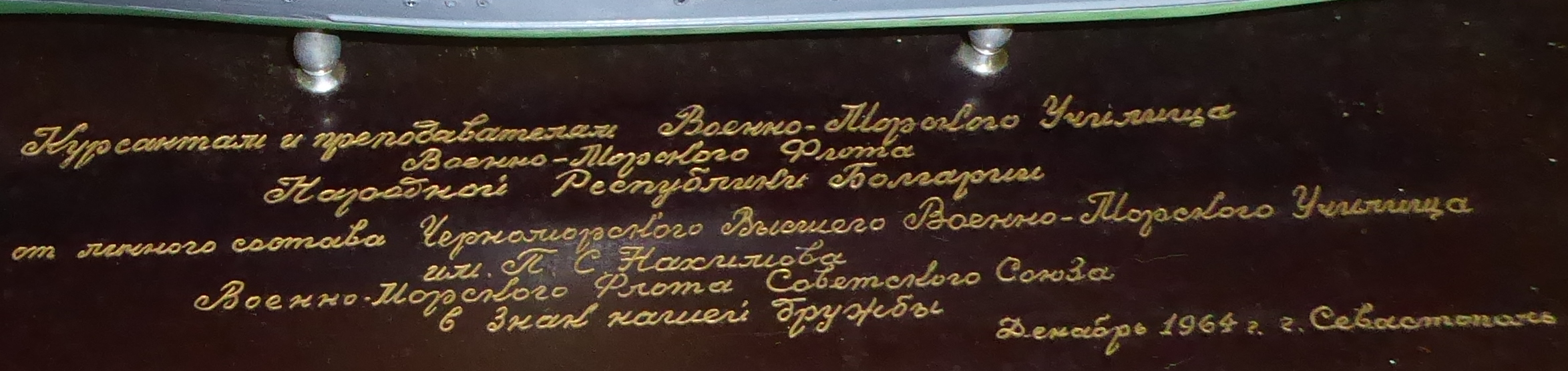 Marineakademie Warna-Widmung von der Marineakademie Nahimov der Sowjetunion Sevastopol 1964